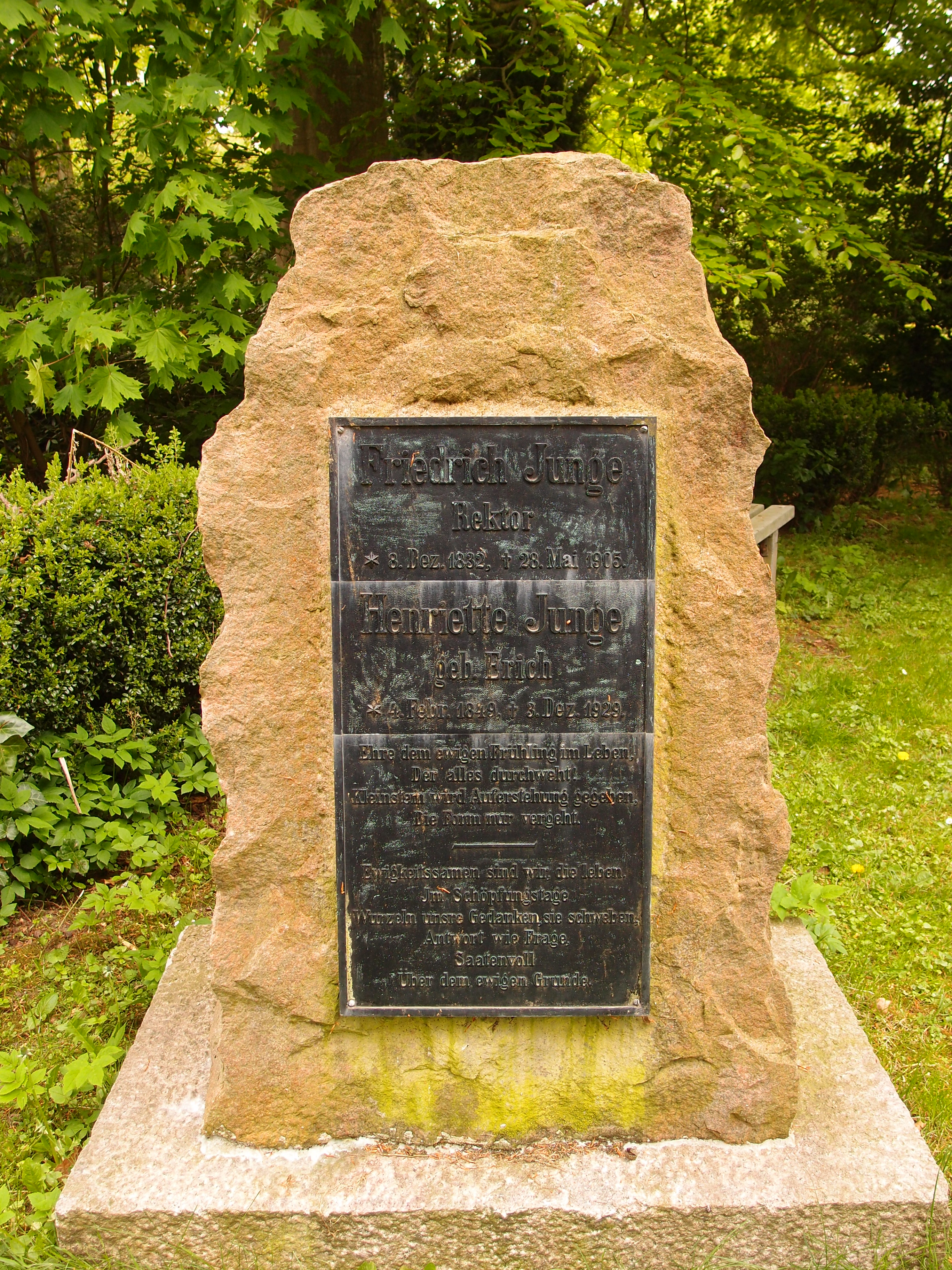 Grab von Friedrich Junge auf dem Parkfriedhof Eichhof, Kiel (mit Versen von Bjørnstjerne Bjørnson)